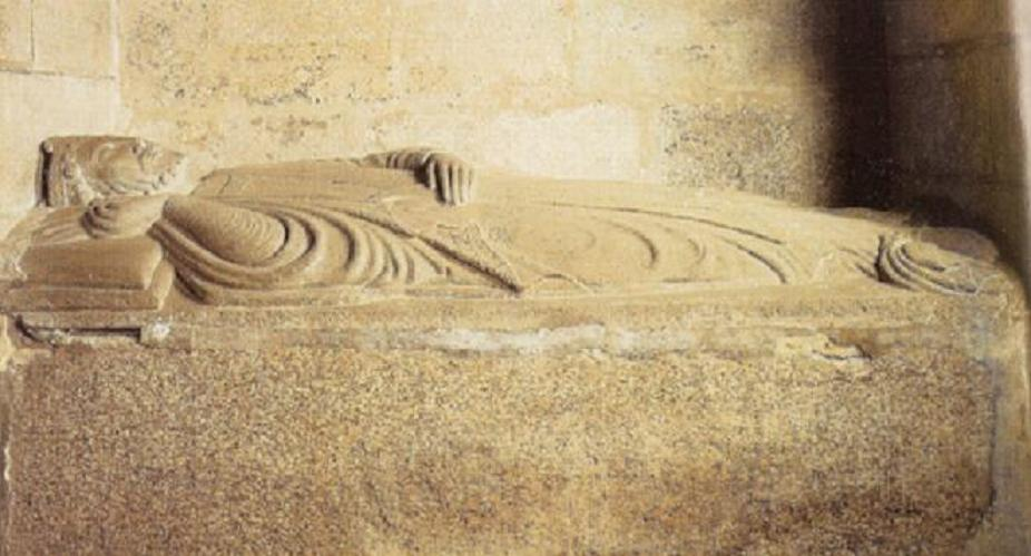 Sepulcro del rey Alfonso IX de León (1171-1230). Se encuentra en la Capilla Real de la catedral de Santiago de Compostela. En la misma capilla se halla el sepulcro del padre de Alfonso IX, Fernando II de León.